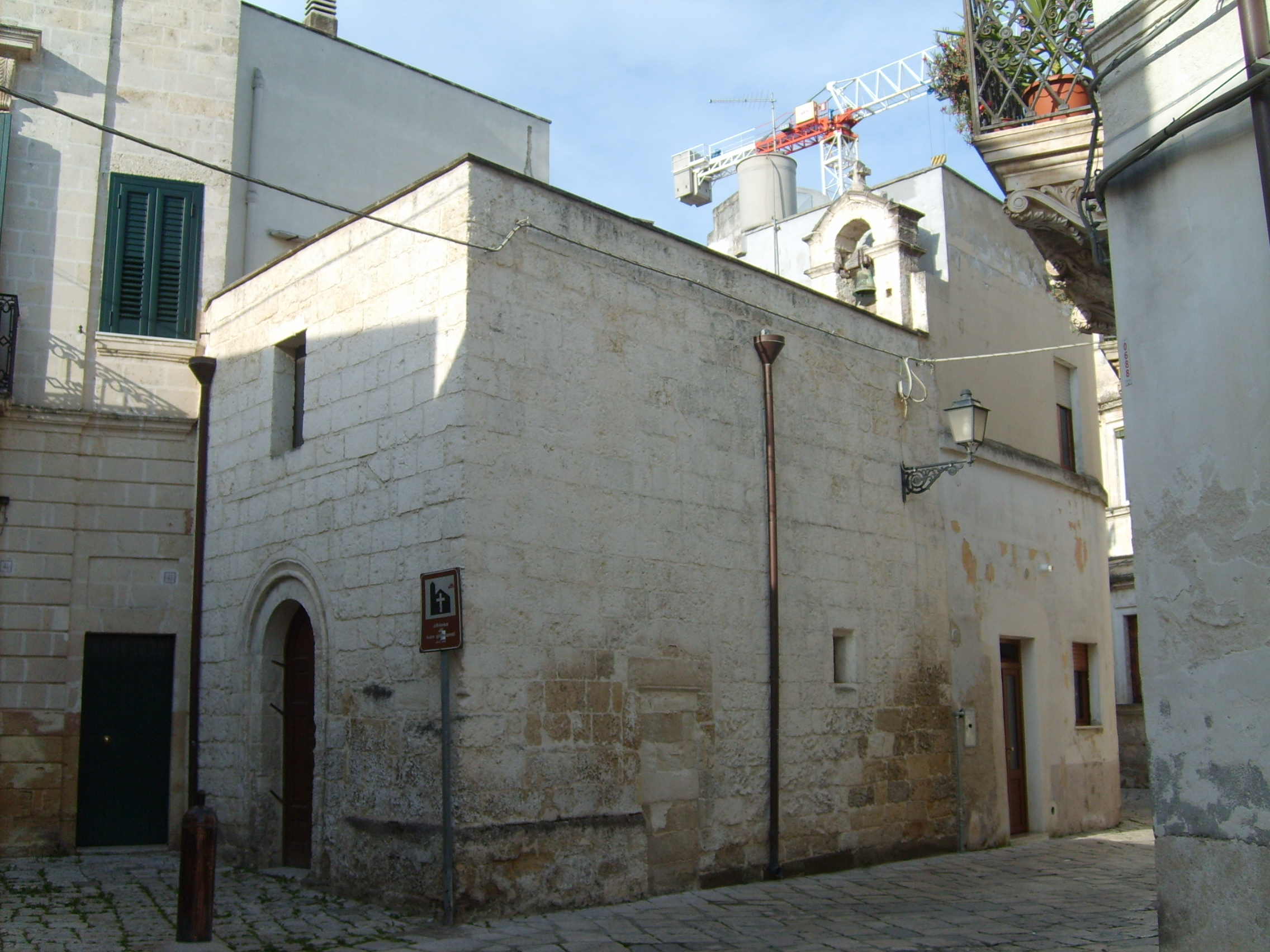 Chiesa San Giovanni